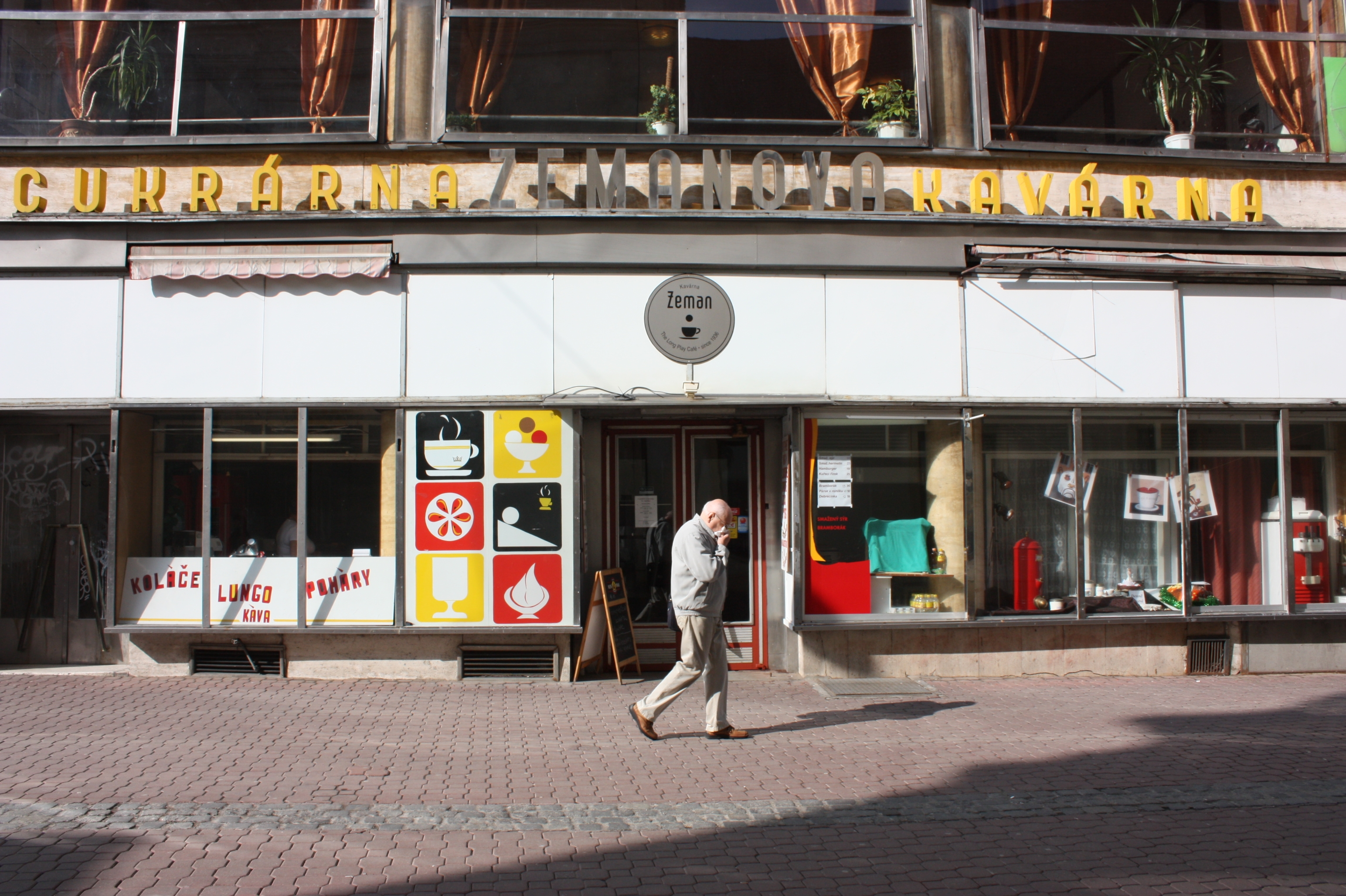 Zemanova cukrárna a kavárna před rekonstrukcí fasády. Stav roku 2011.